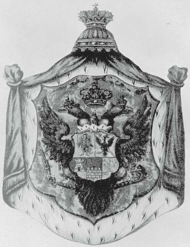 Герб Малоросії (проект Герольдконтори№1)